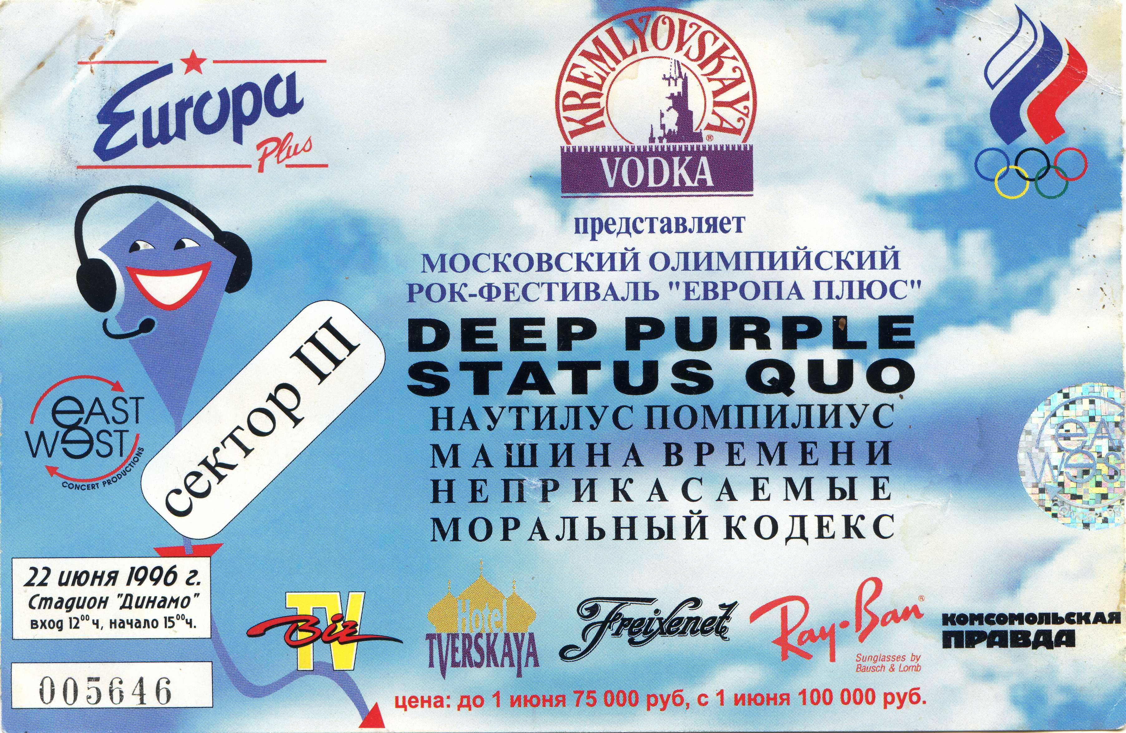 Билет на концерт группы Deep Purple 22 июня 1996 года